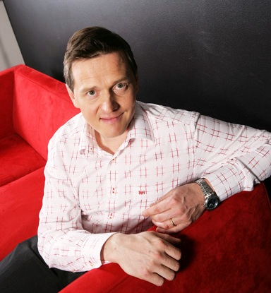 Description